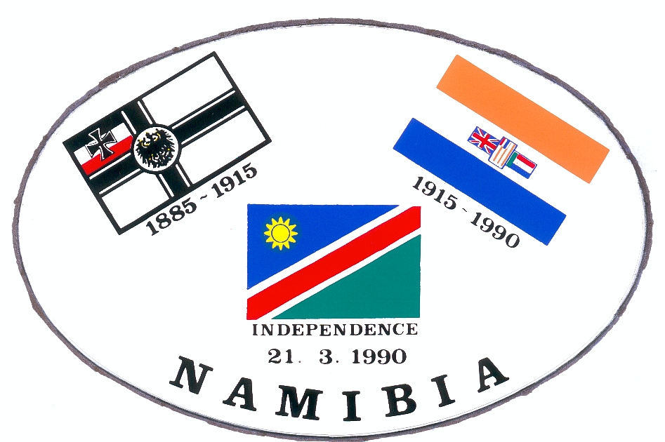 Merchandising post colonial (Fish River Canyon, Namibie)